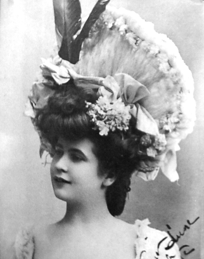 Portrait chanteuse Frehel Pervenche 1908